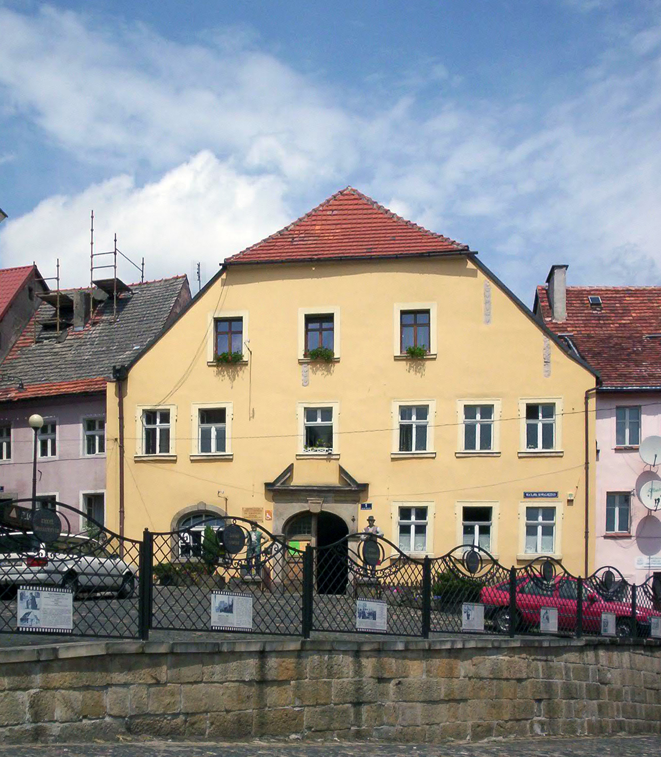 Muzeum Kargula i Pawlaka w Lubomierzu 01.1964.